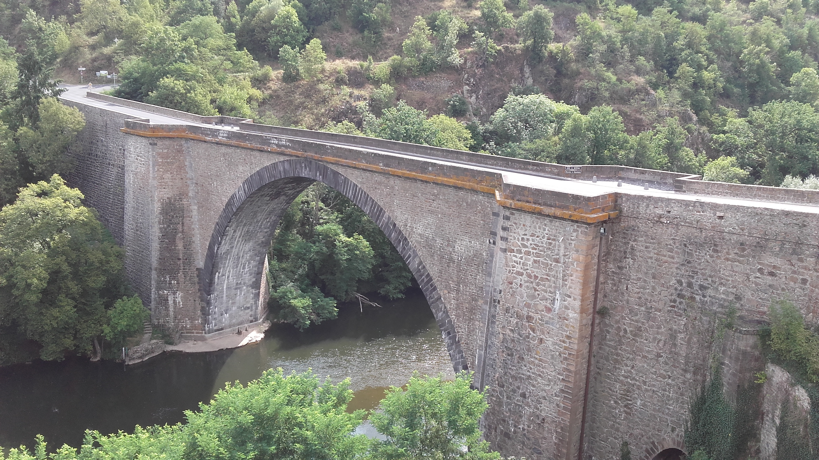 Pont de Vieille-Brioude vu du jardin de l'église Saint-Anne. Il permettait à la nationale 102 de franchir l'Allier avant la mise en service de la déviation.